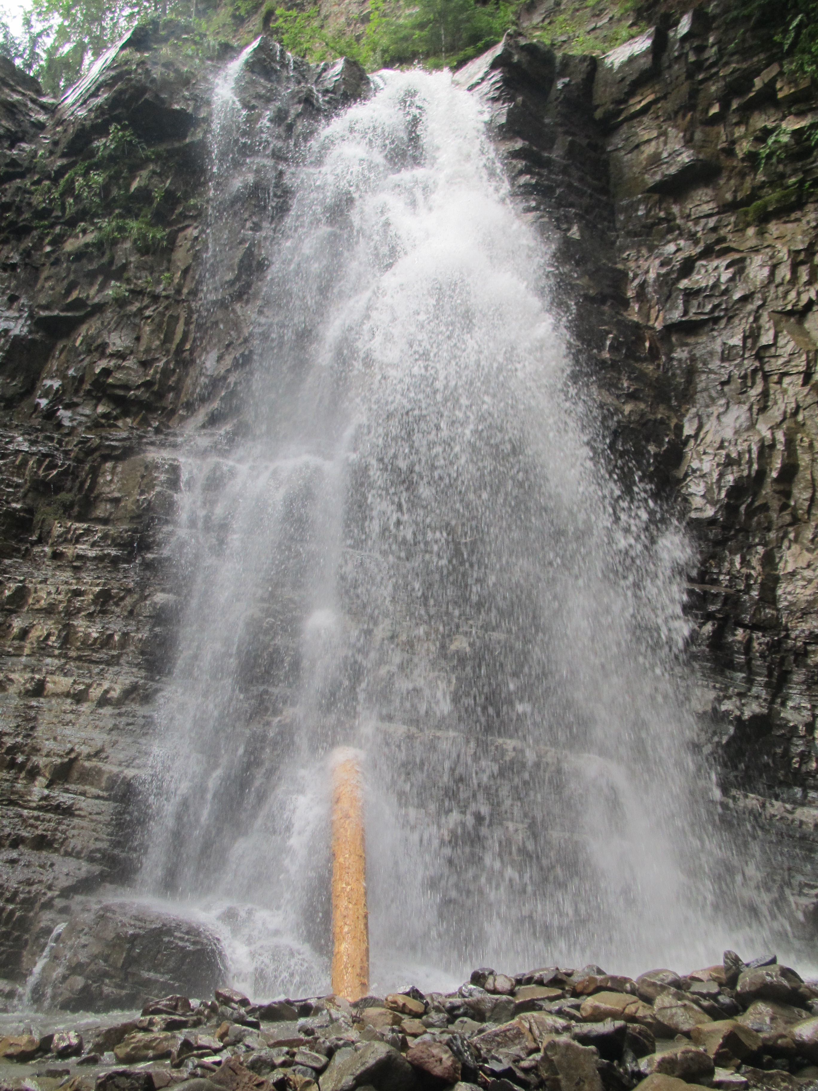 Манявський водоспад після дощу